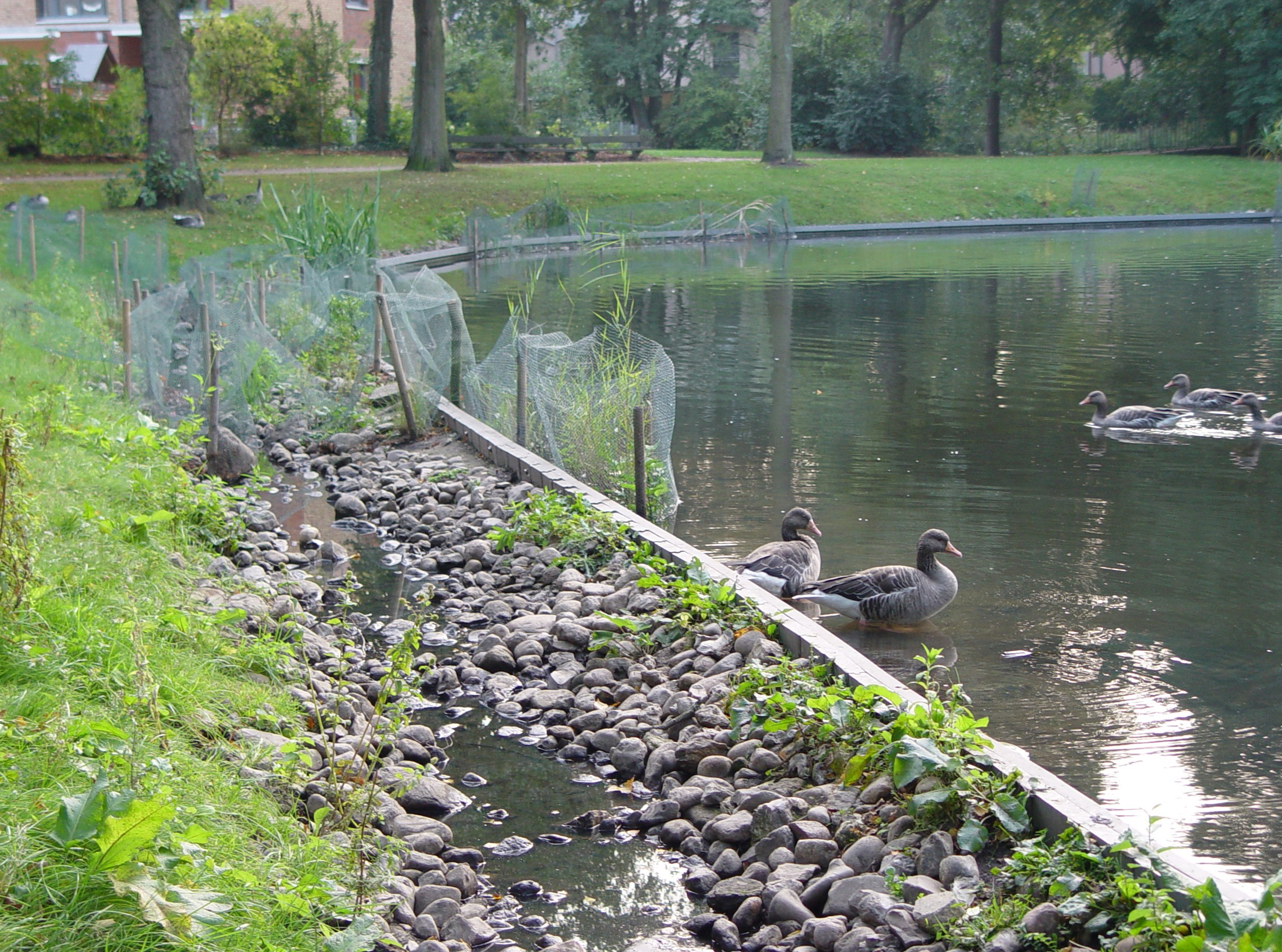 Der Bach Schillingsbek wird im Von-Eicken-Park zur Verbesserung der Wasserqualität am Rückhaltebecken vorbei geführt.